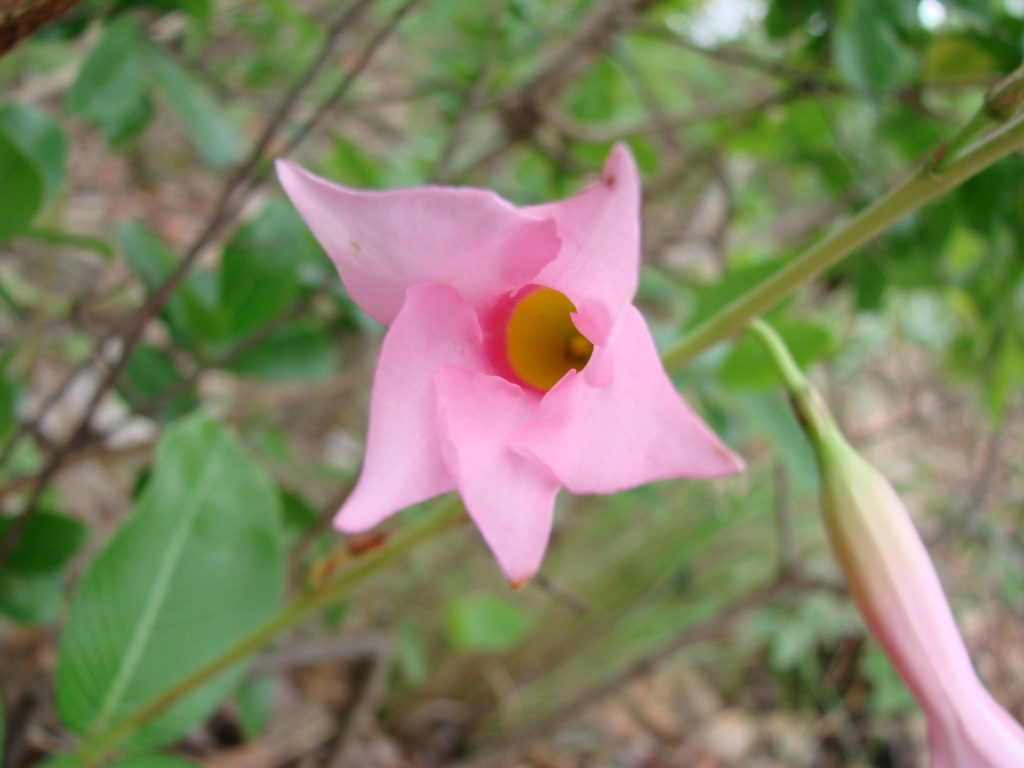 Mandevilla martiana - APOCYNACEAE São Sepé - Brasília - Distrito Federal - Brasil.